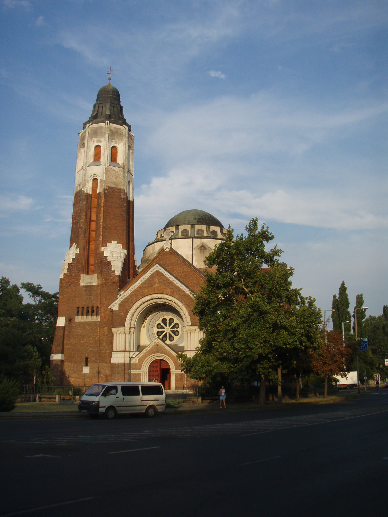 Attila téri görög katolikus templom Istenszülő Oltalma Görög Katolikus Templom. Épült Bobula János tervei alapján, 1910. - Debrecen, Attila tér